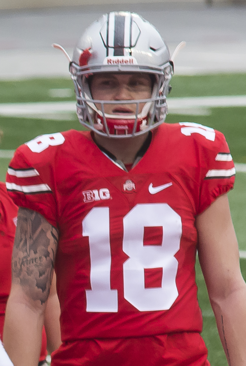 Tate Martell in 2017